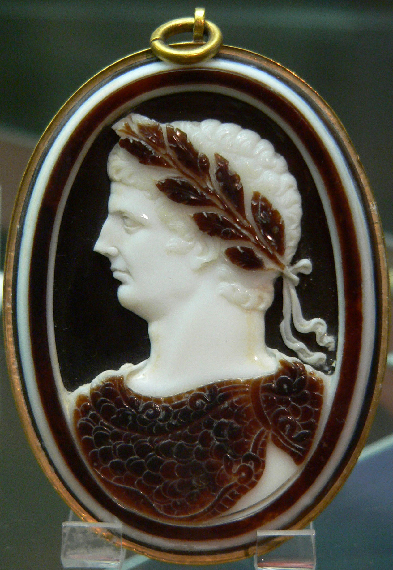 Raoul Musoni Buste de Claude, sardonyx, or (monture d'or du XVIe siècle). Ce camée a appartenu au Trésor de Saint-Denis. Acquisition en 1791